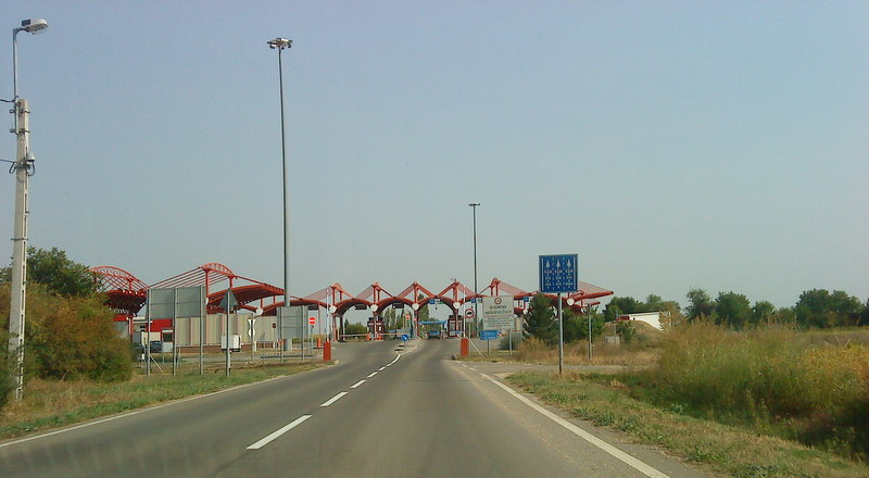 Beremendi határátkelőtől északra